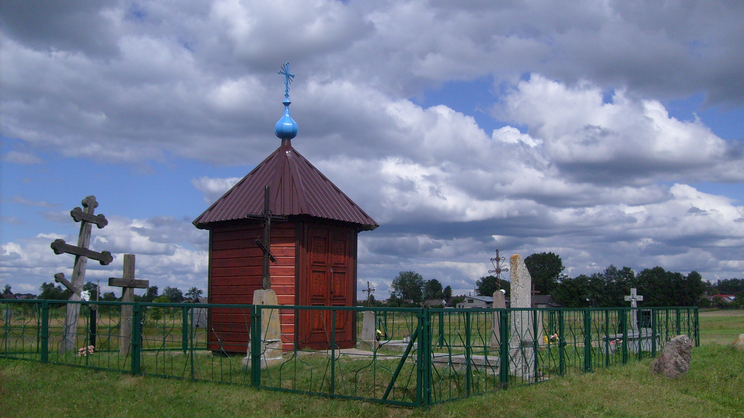 Kapliczka i cmentarz prawosławny na osiedlu Górne w Hajnówce